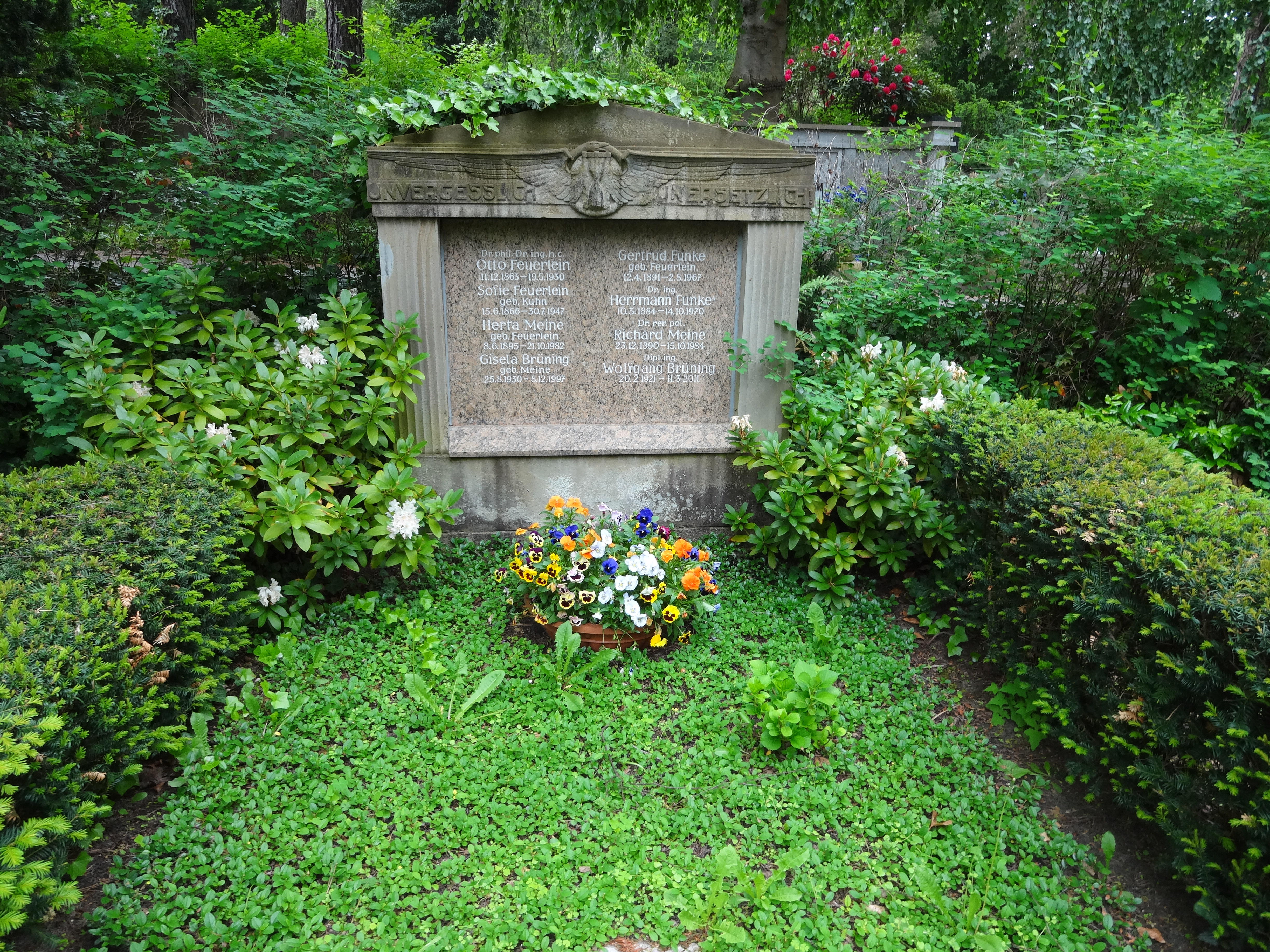 Grab unter anderem für Herrmann Funke und Otto Feuerlein auf dem Friedhof Heerstraße in Berlin